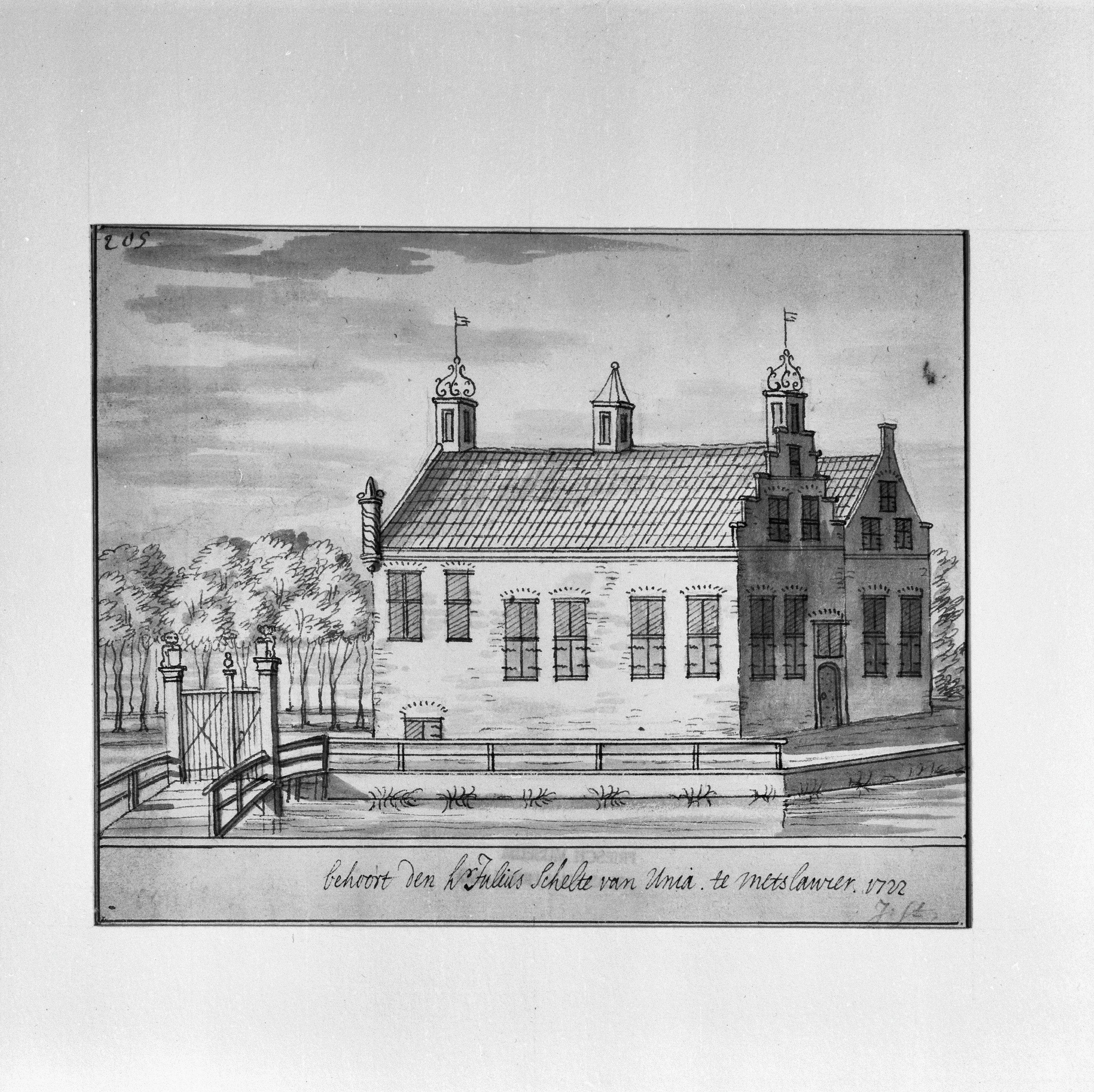 Huis van Julius Schelte van Unia: tekening 1722, in Collectie Fries Museum